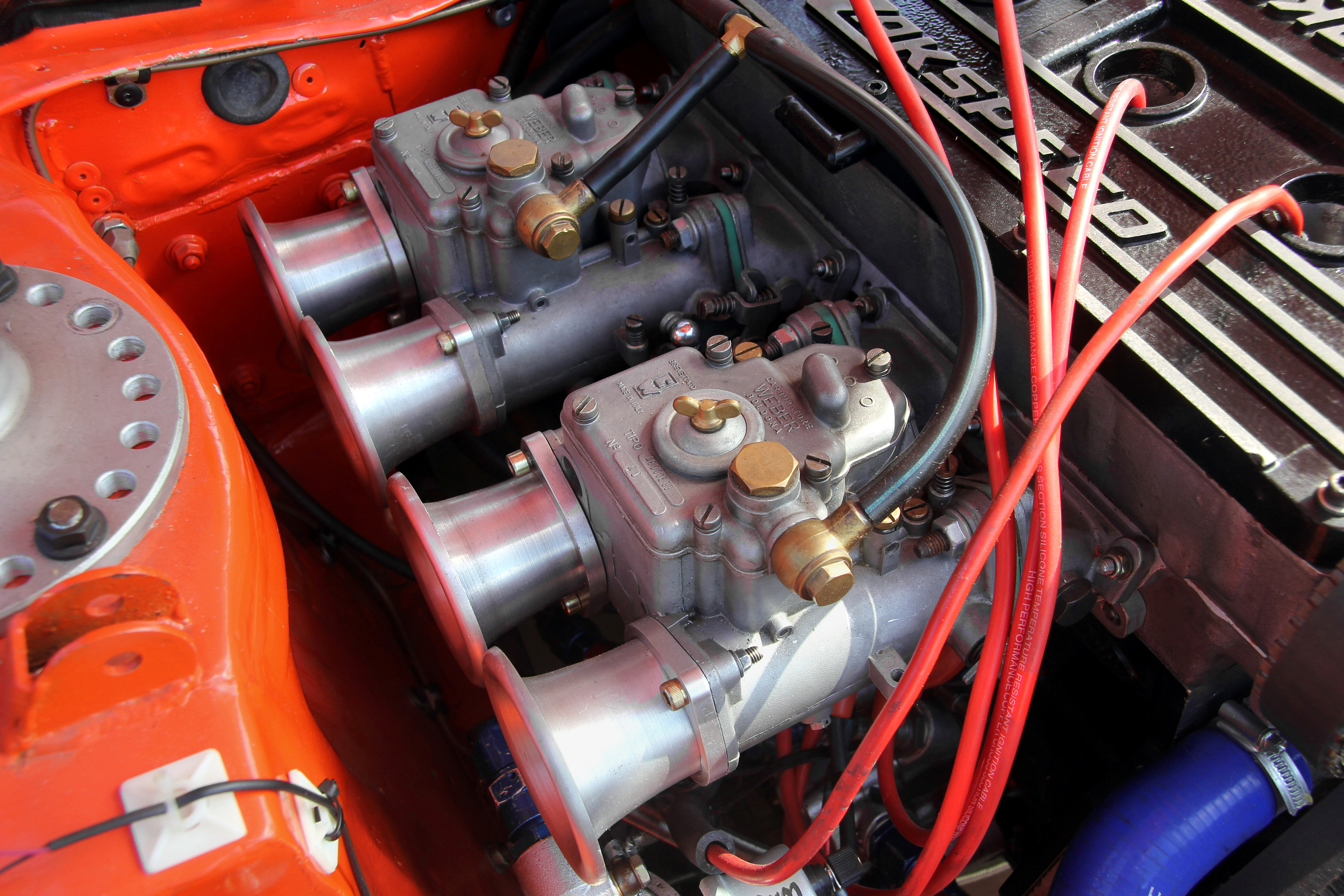 Weber Doppelvergaser 48 DCOE 99 in einem Ford Escort mit Zakspeed-Tuning